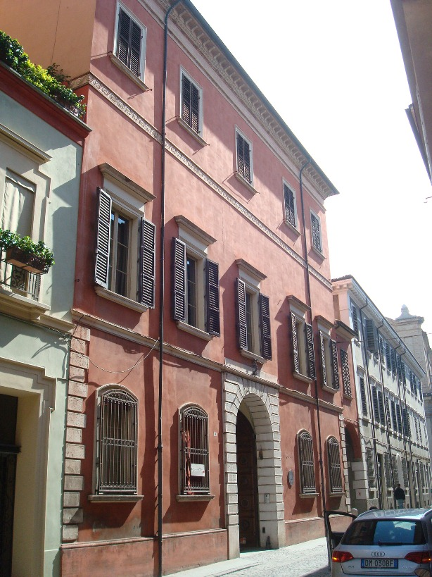 Cesena (Italie), façade avant du palazzo Braschi